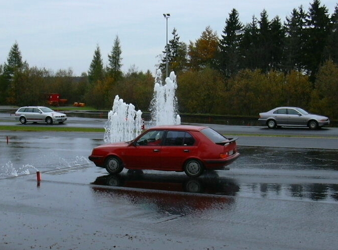 "Volvo 360GLT beim Fahrsicherheitstraining", Erlaubnis: Ticket#: 2006051010011511